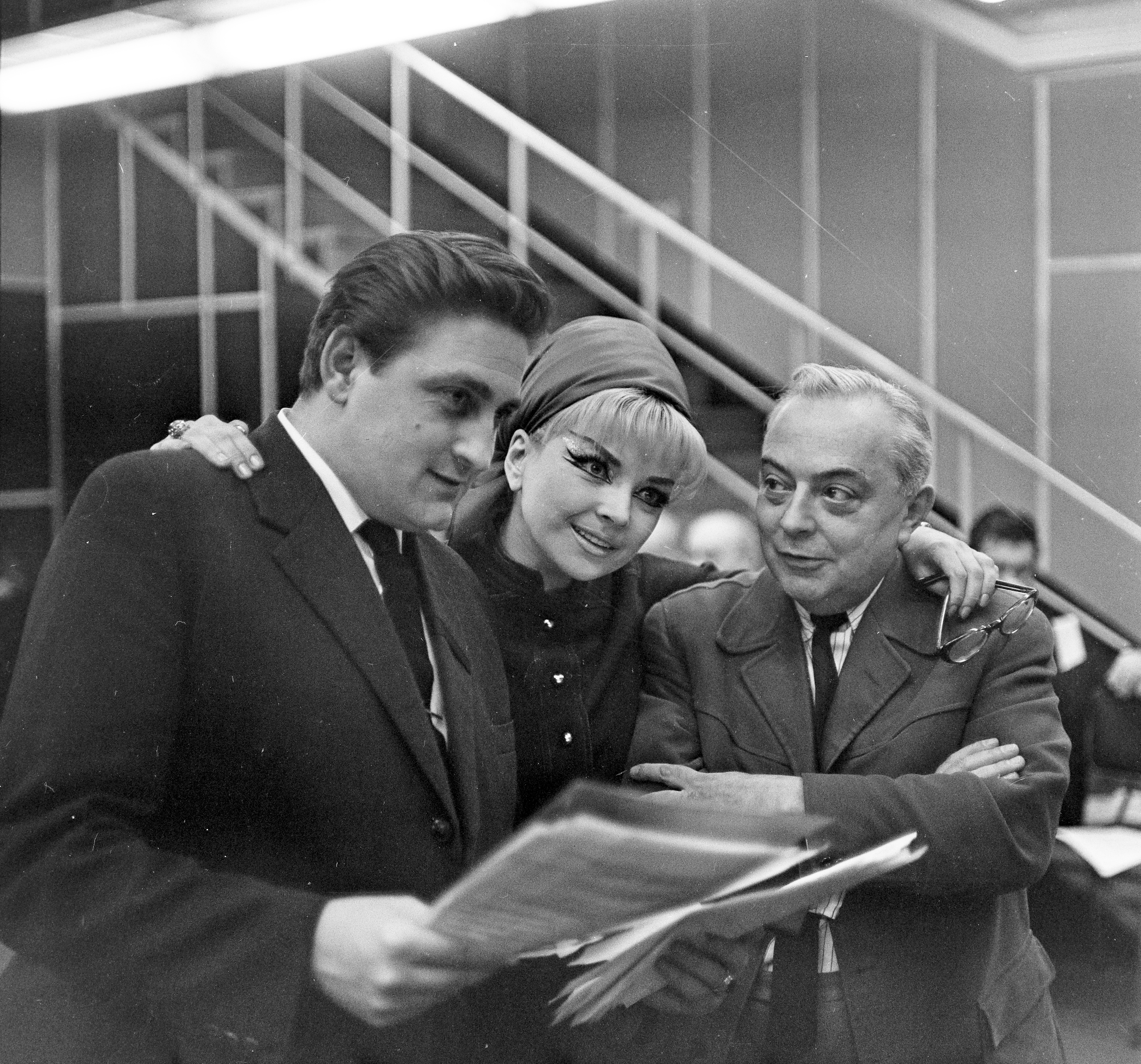 Korondi György, Házy Erzsébet és Feleki Kamill a Magyar Rádió stúdiójában a Csárdáskirálynő rádióváltozatának felvételekor